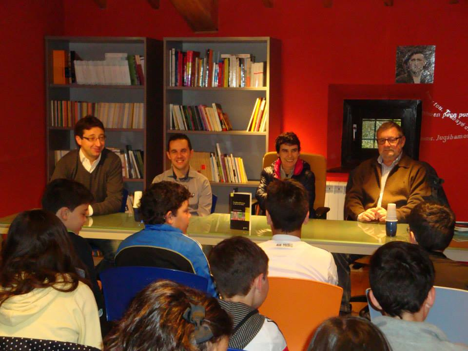 Presentación del llibru "Fontenebrosa. El reinu de los silentes" de Vicente García Oliva